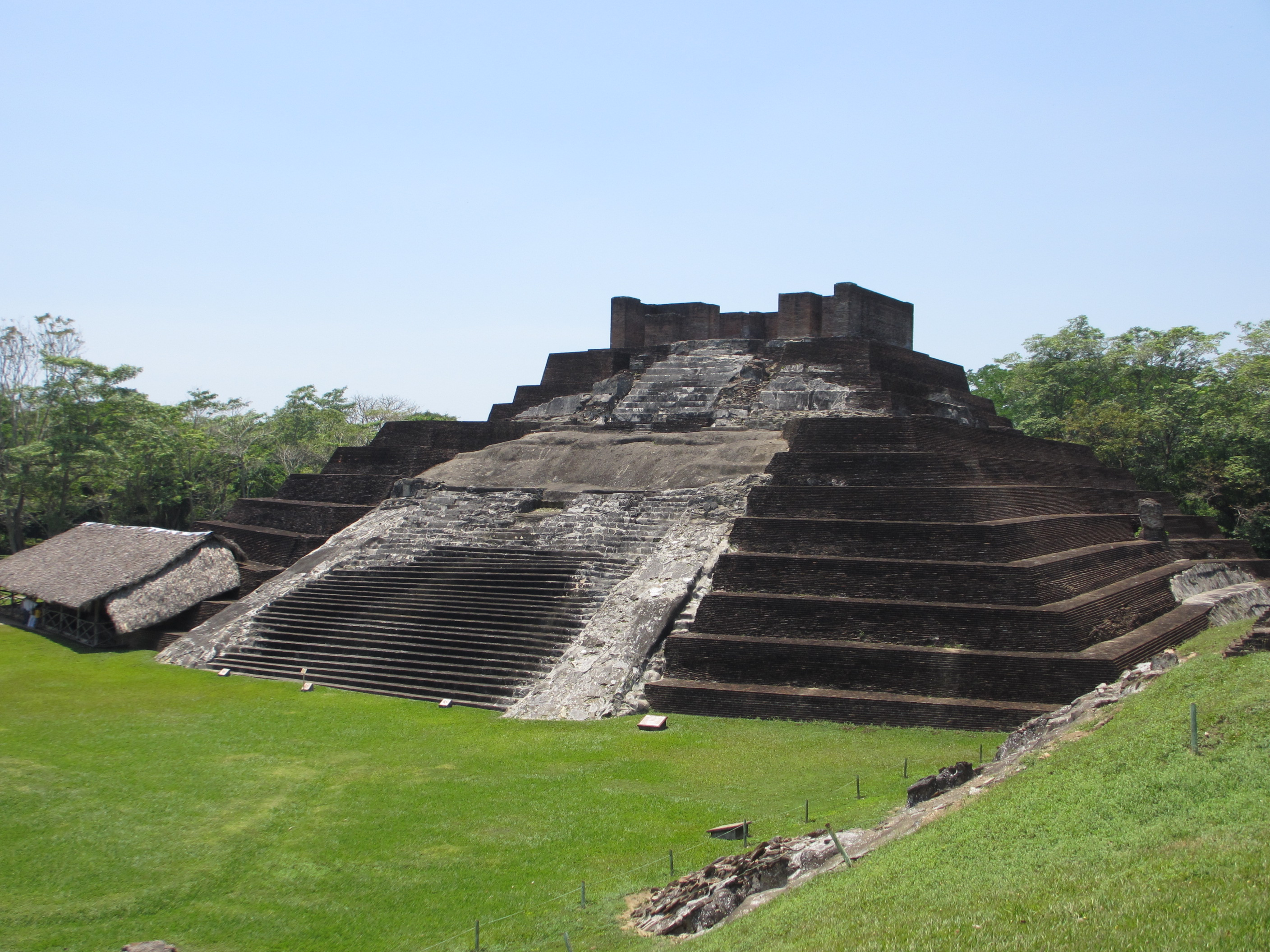 El Templo 1 visto desde el Templo 5